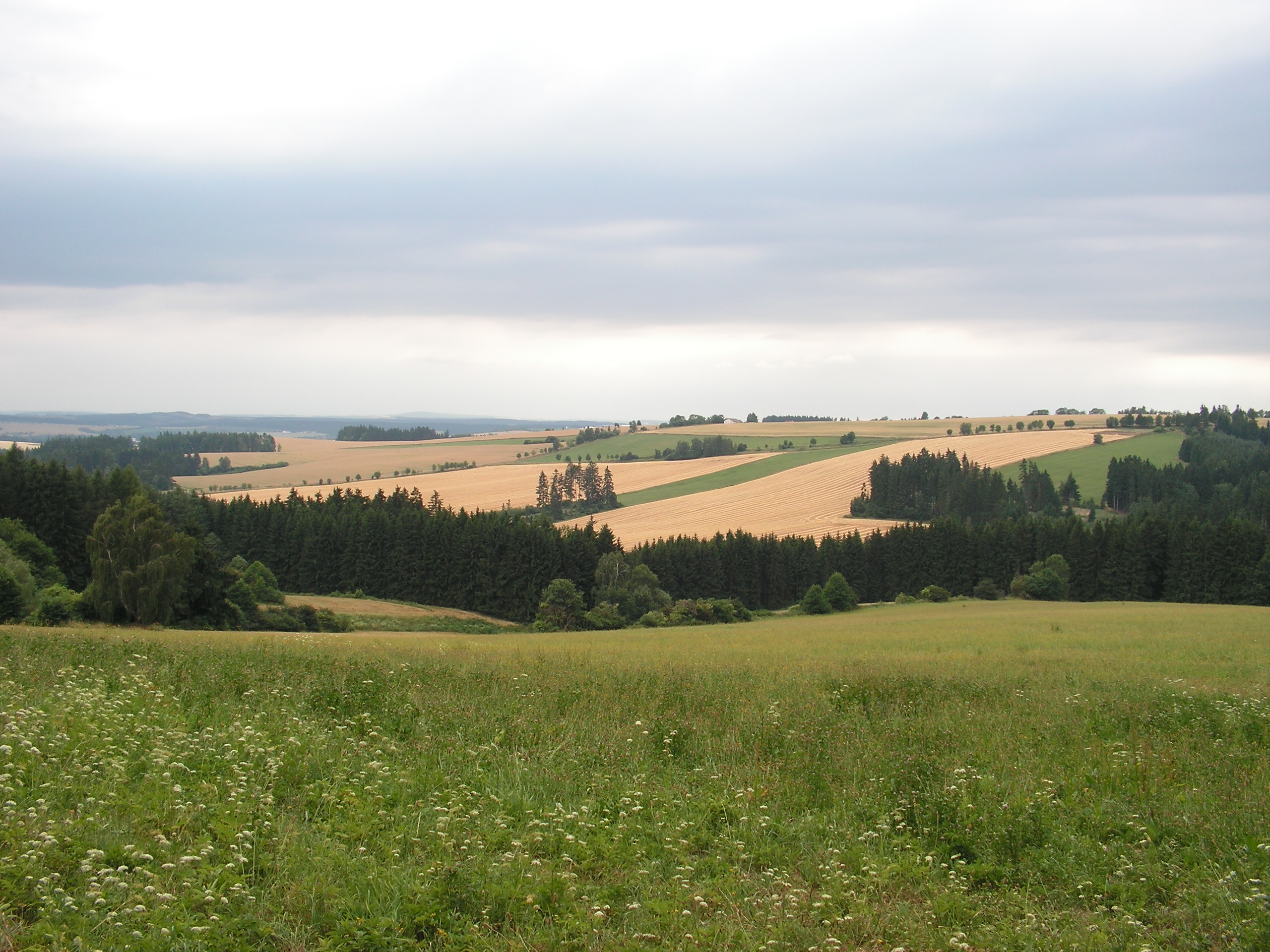 Údolí Olešenského potoka pod Zdeslavicemi v okrese Havlíčkův Brod.